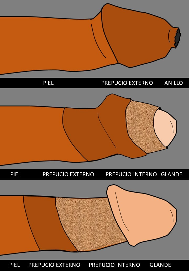 Proceso de retaccion del prepucio indicando los tipos de piel y el desarrollo proporcional medio